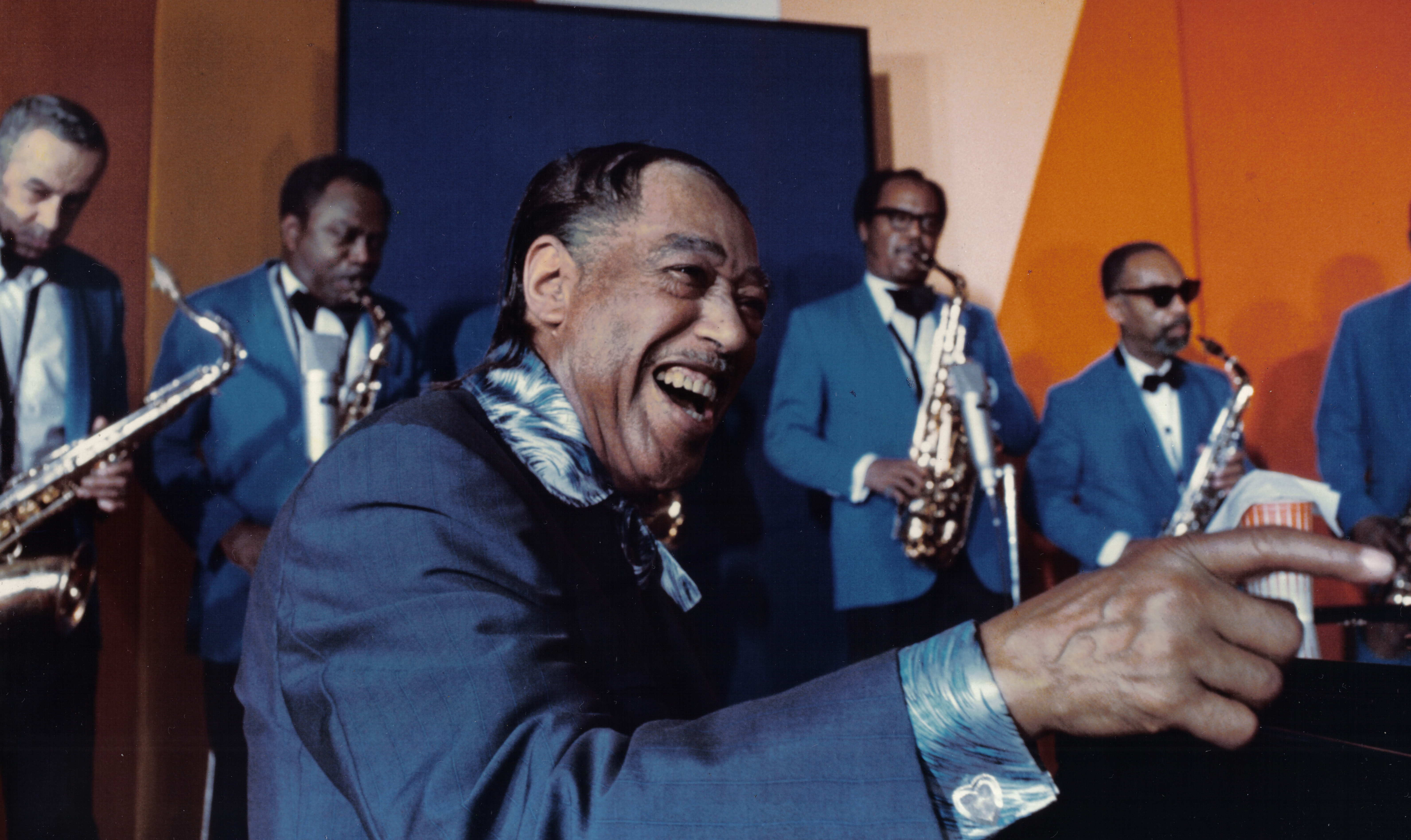 Duke Ellington dans le film l'Aventure du jazz - Jazz Odyssey